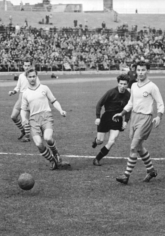 Zentralbild-Beyer Bey-Ka. 22.4.1956 Vorwärts schlug Lok Leipzig 1:0 - Am Sonntag, dem 22.4.1956, standen sich im Berliner Walter-Ulbricht-Stadion in einem Meisterschaftsspiel der Fußballoberliga die Mannschaften von Vorwärts Berlin und Lok Leipzig gegenüber. Die Berliner Gemeinschaft gewann knapp mit 1:0. UBz.: Sicher klärt die Vorwärts-Abwehr. V.l.n.r.: Reichelt (halbverdeckt), Eilitz, Konzack (Lok) und Unger.